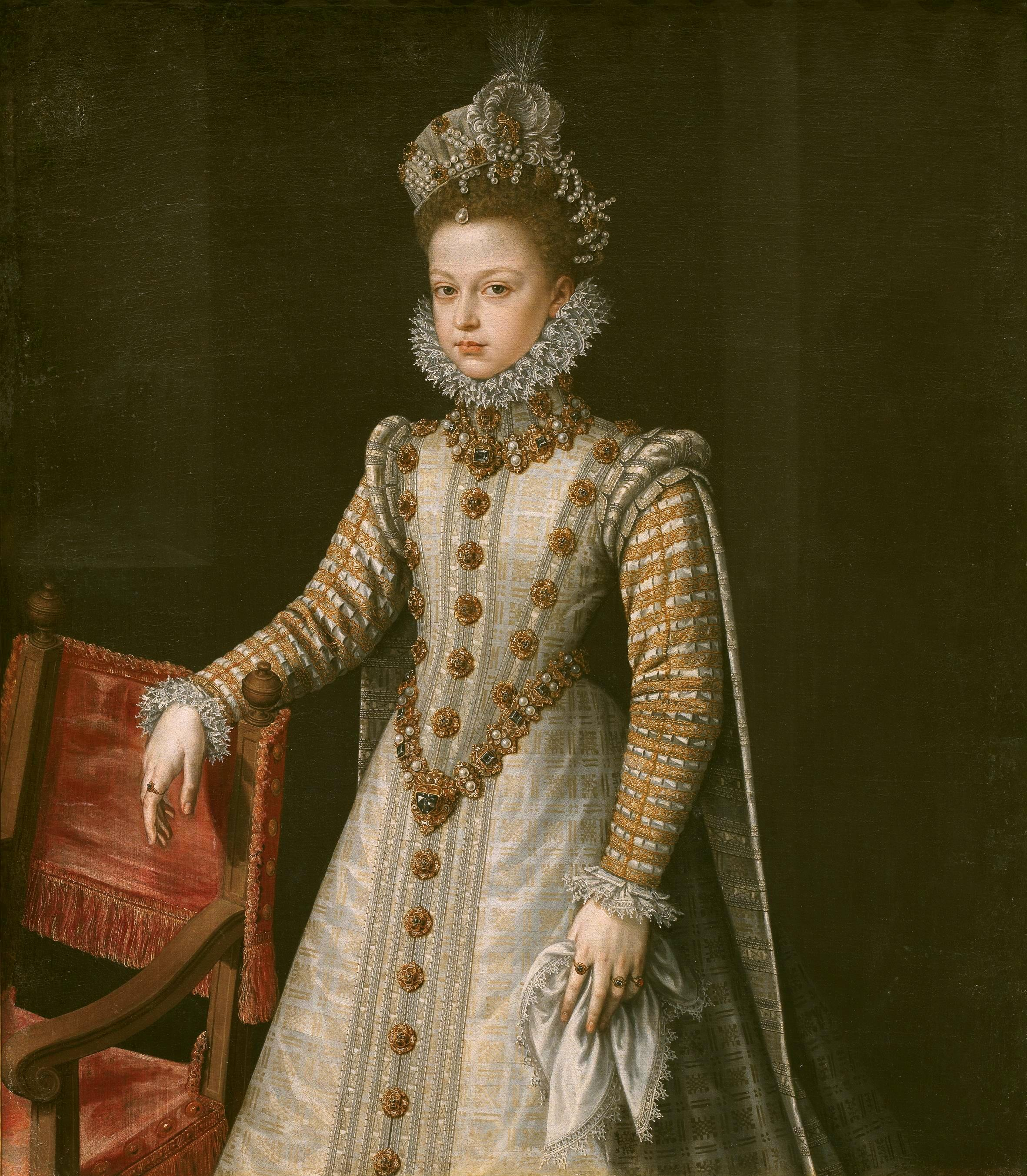 Retrato de la infanta Isabel Clara Eugenia (1566-1633), que fue hija del rey Felipe II de España, esposa del archiduque Alberto de Austria y también soberana y posteriormente gobernadora de los Países Bajos.